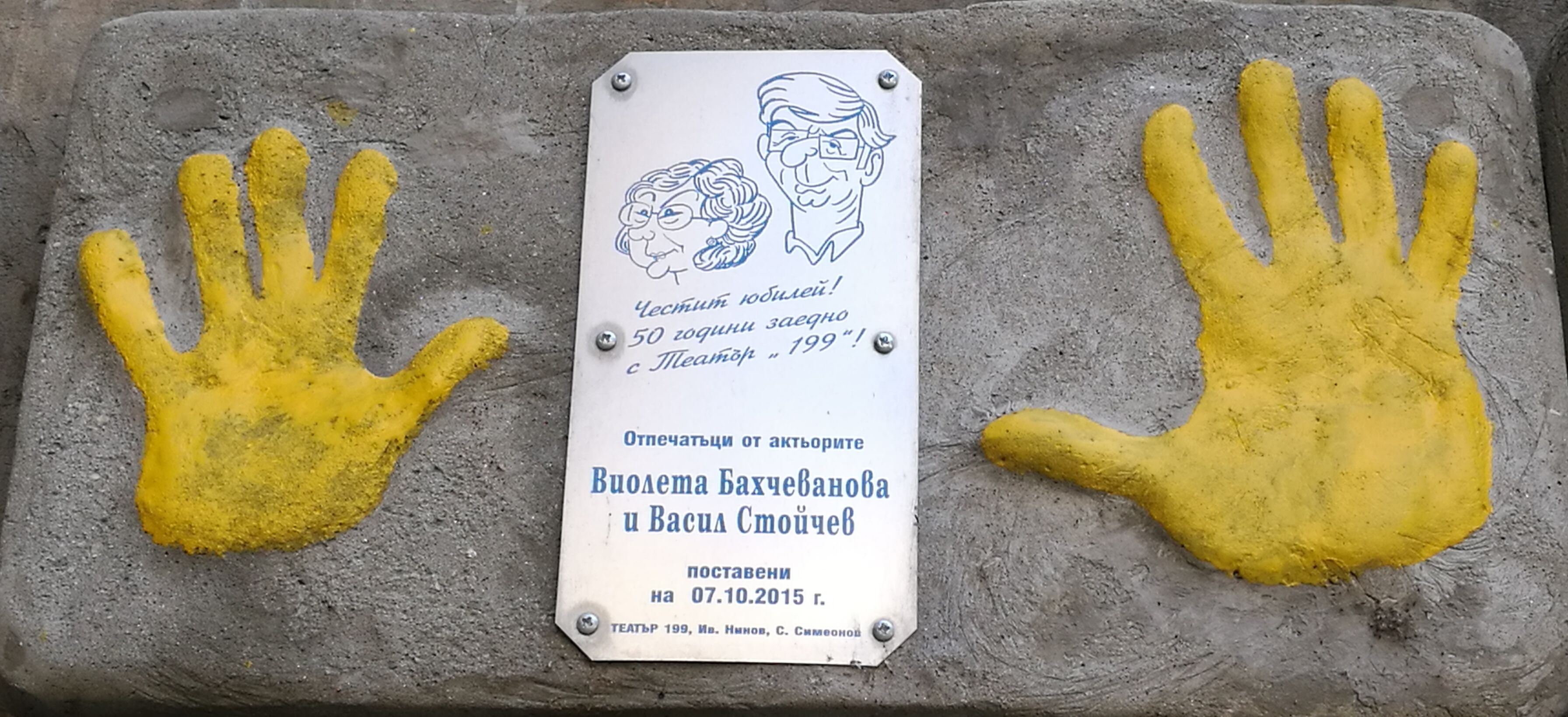 Стената на славата пред Театър 199 - пано с отпечатъци, послание и шарж на Виолета Бахчеванова и Васил Стойчев.